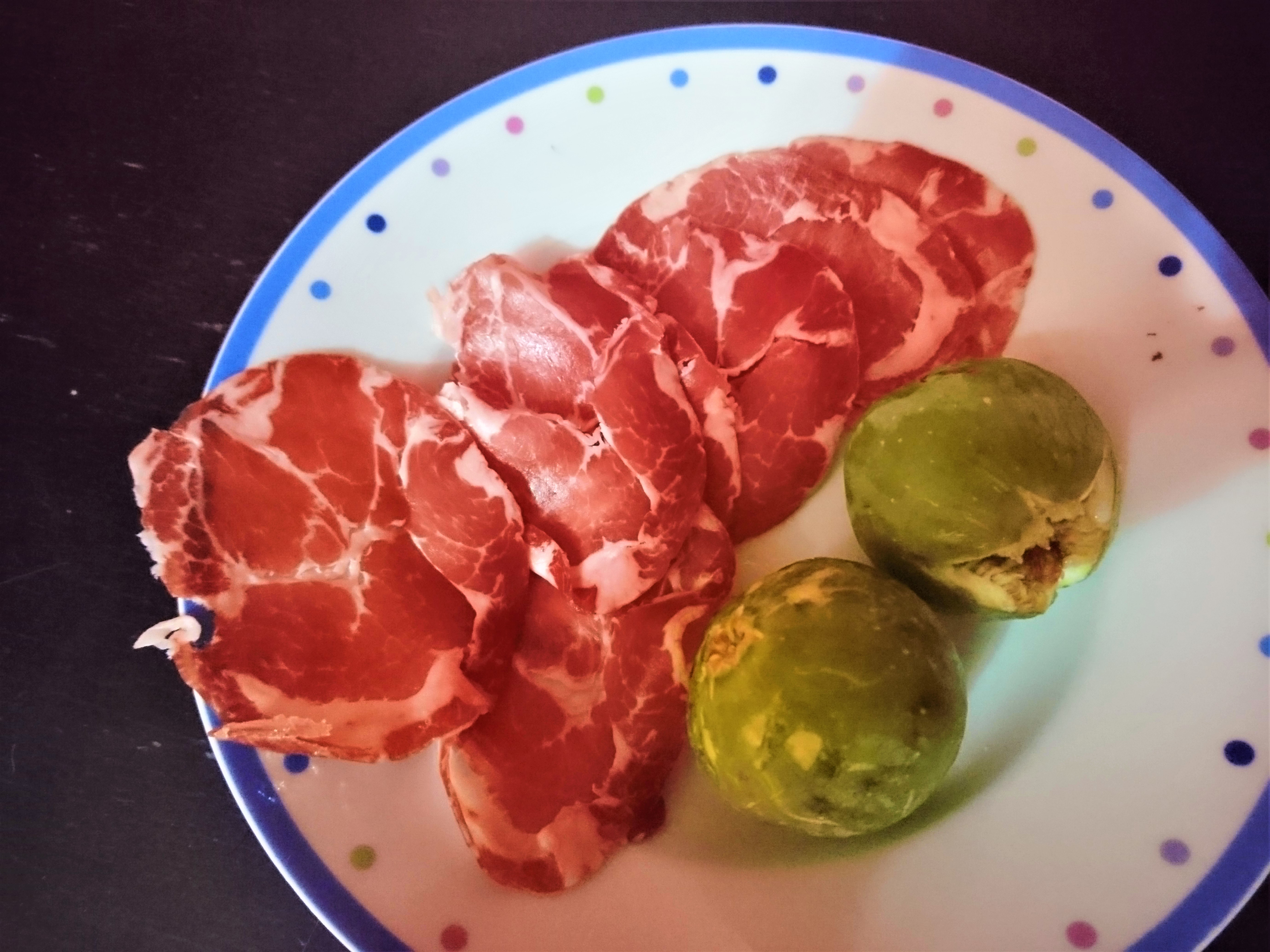 capocollo di martina con fichi